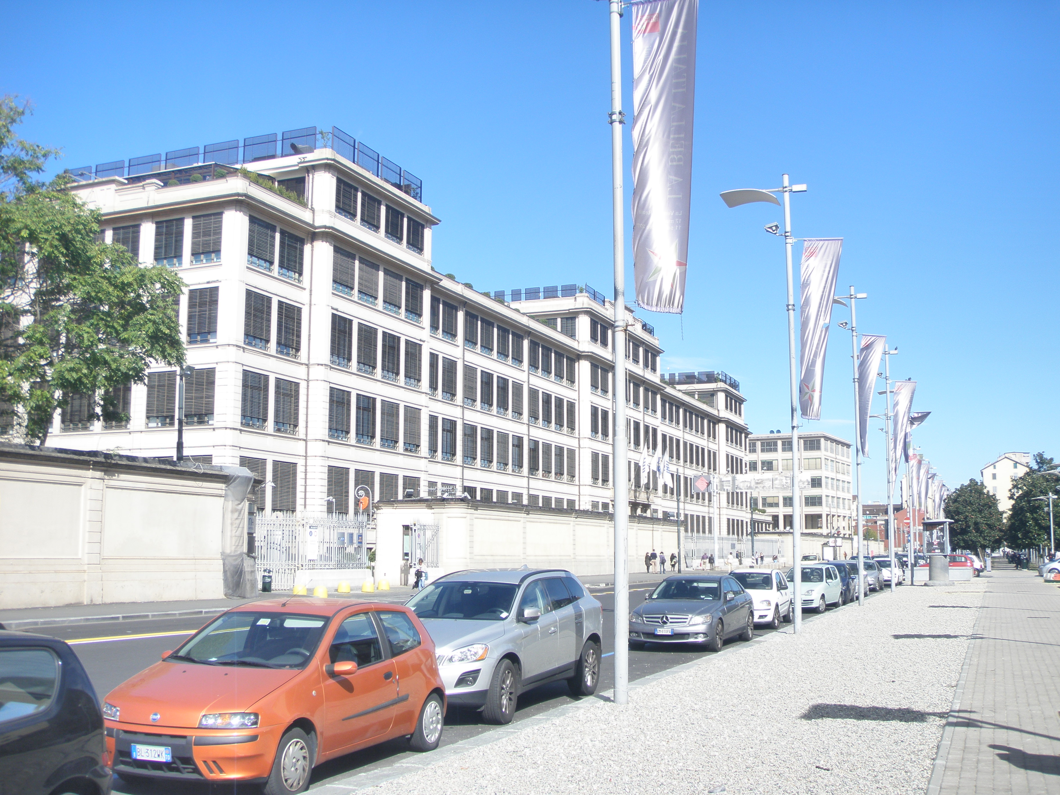 Sede del Grupo FIAT